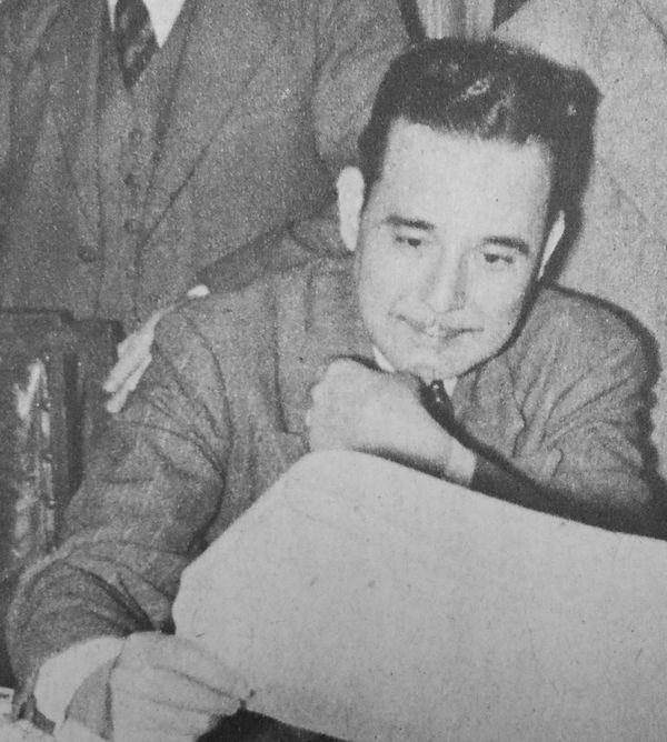 鈴木傳明